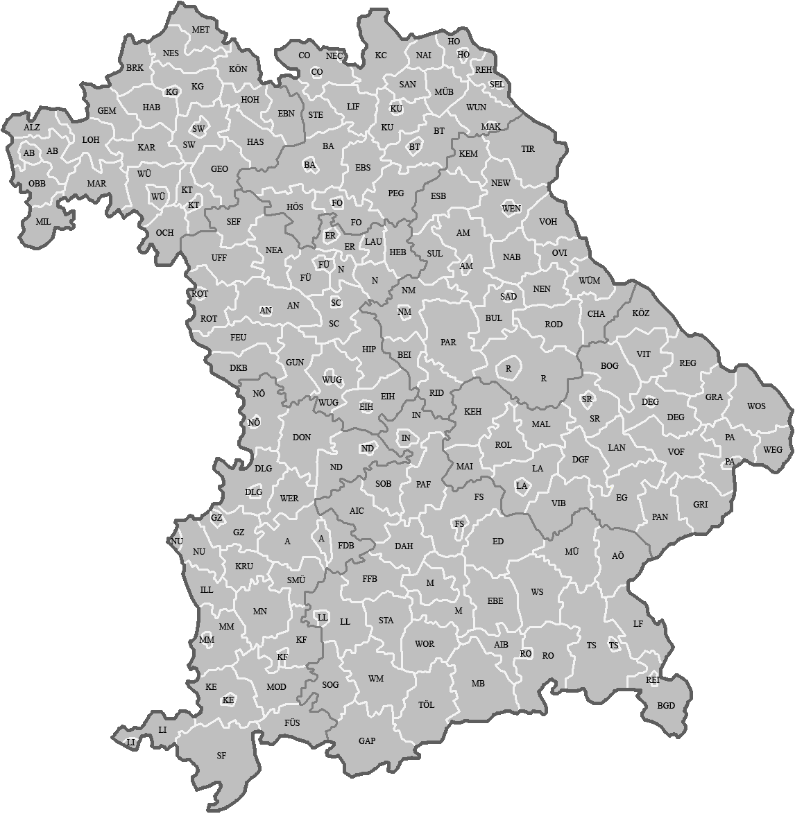 Landkreise in Bayern 1966